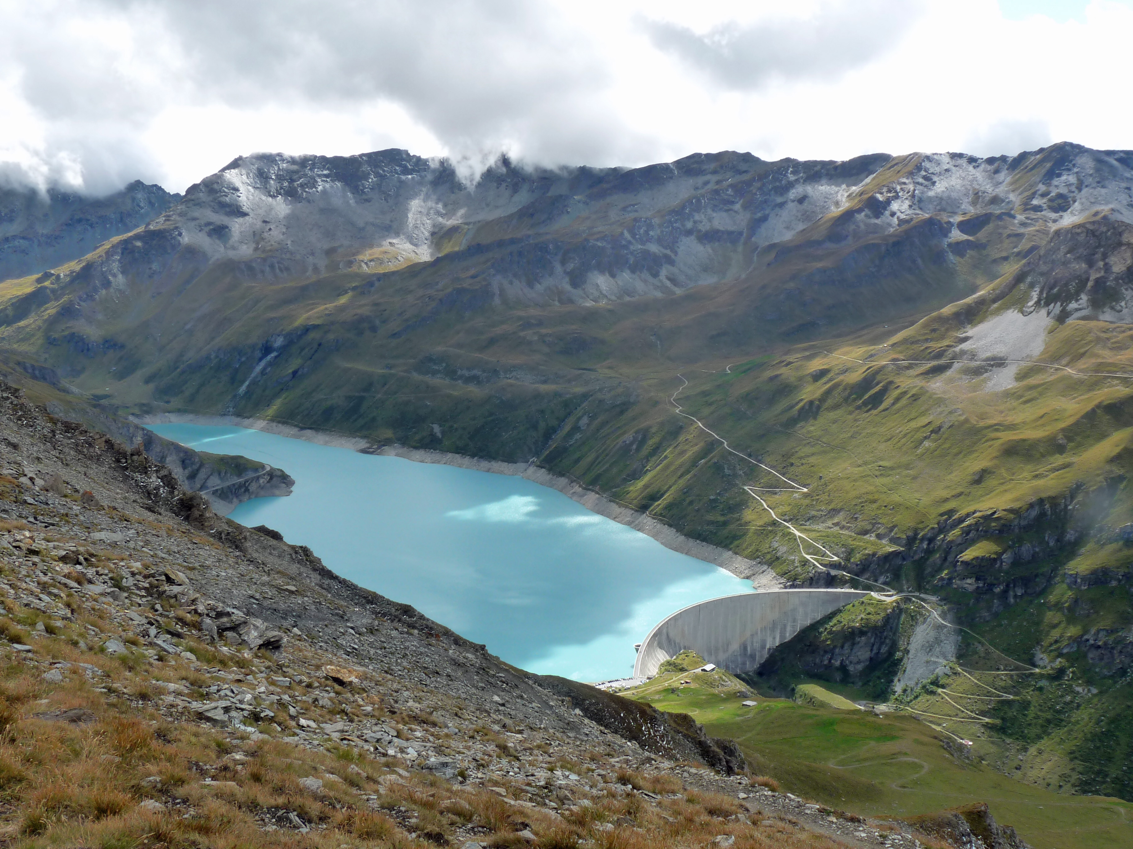 Vue sur le lac de barrage de Moiry (Valais, Suisse), en venant de Sorebois.